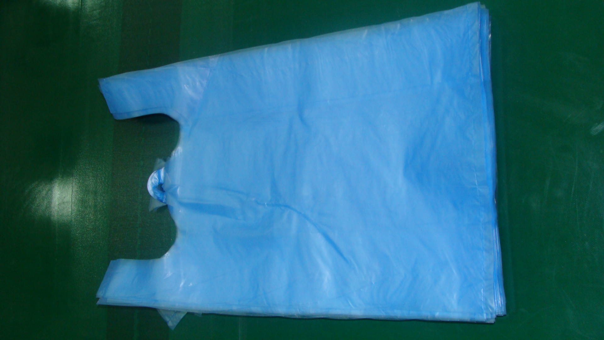 AL_DHAFRA_PLASTIC_FACTORY